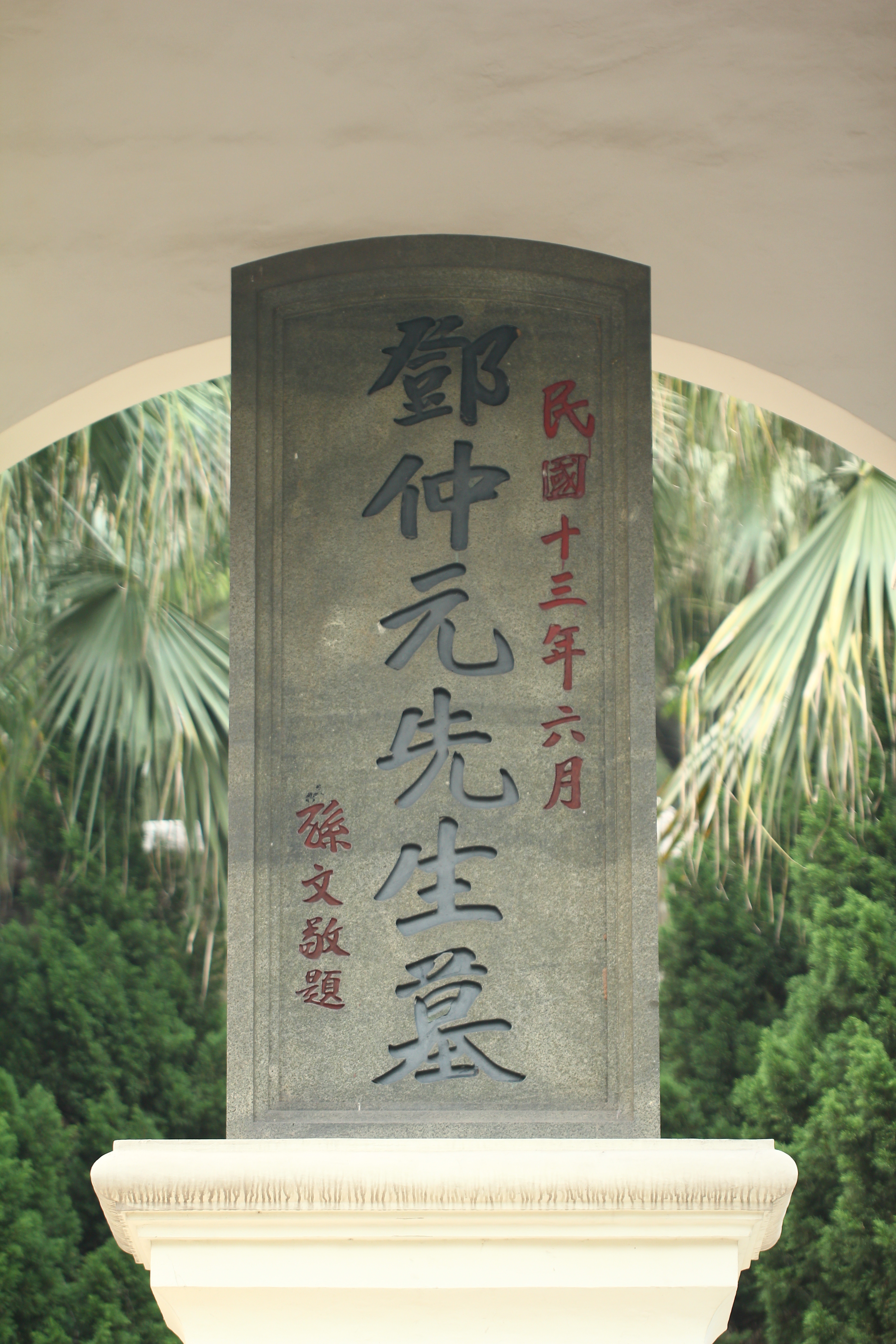 中華民國十三年六月立於黃花崗公園。孫中山題字。